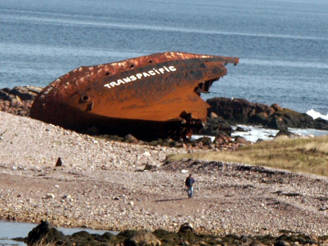 Wreck on the Île aux Marines, Saint-Pierre-et-Miquelon